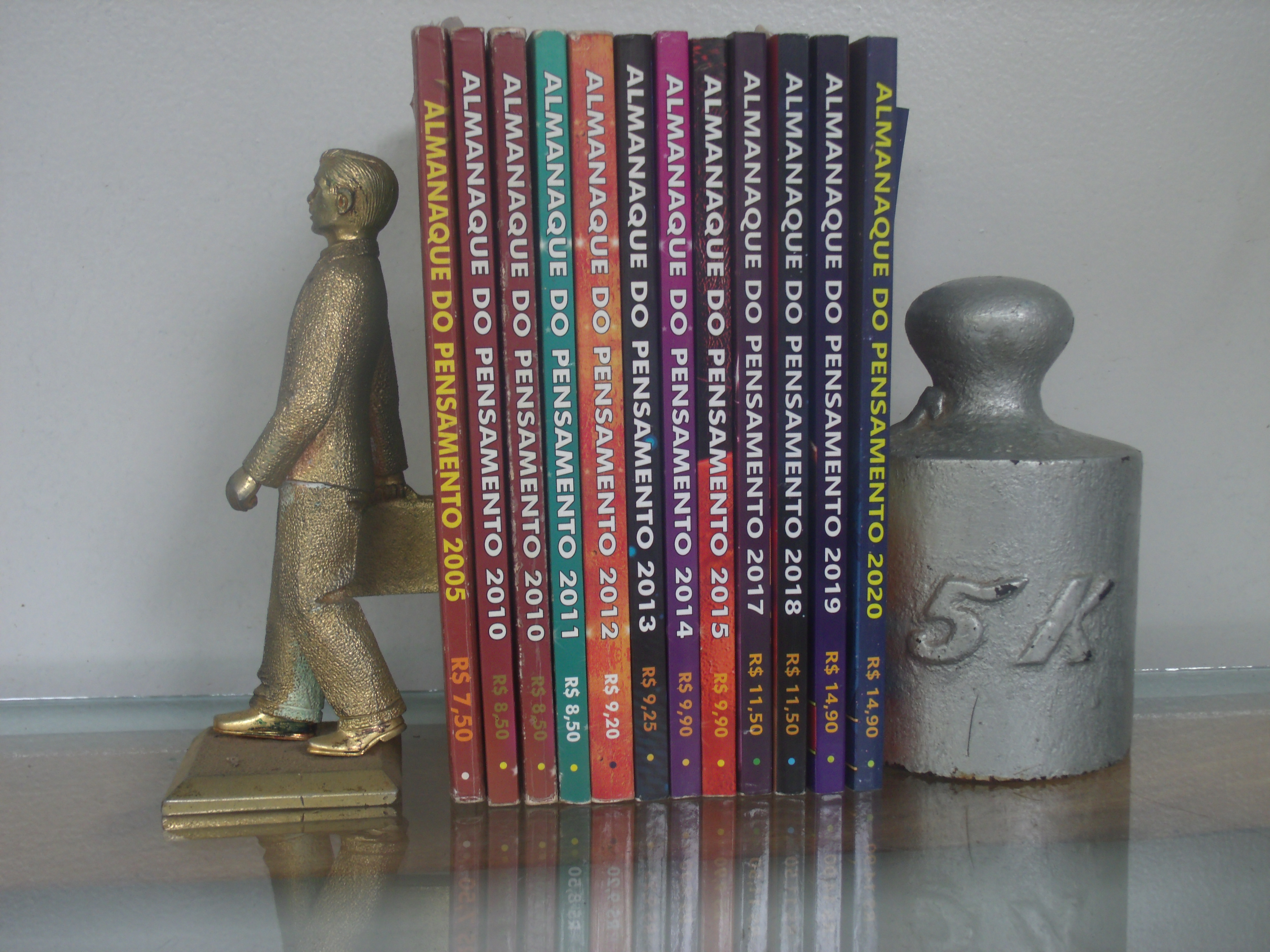 Coleção de alguns Almanaque do Pensamento com suportes de organização de acervos.